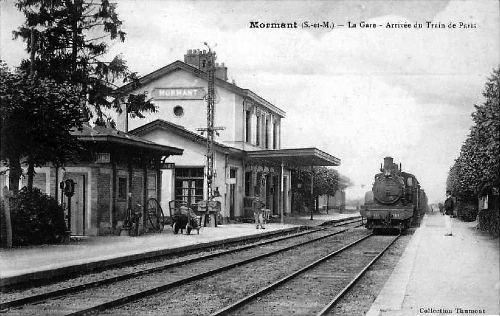 Gare de Mormant : l'intérieur de la gare avec l'arrivée du train de Paris au début des années 1900.